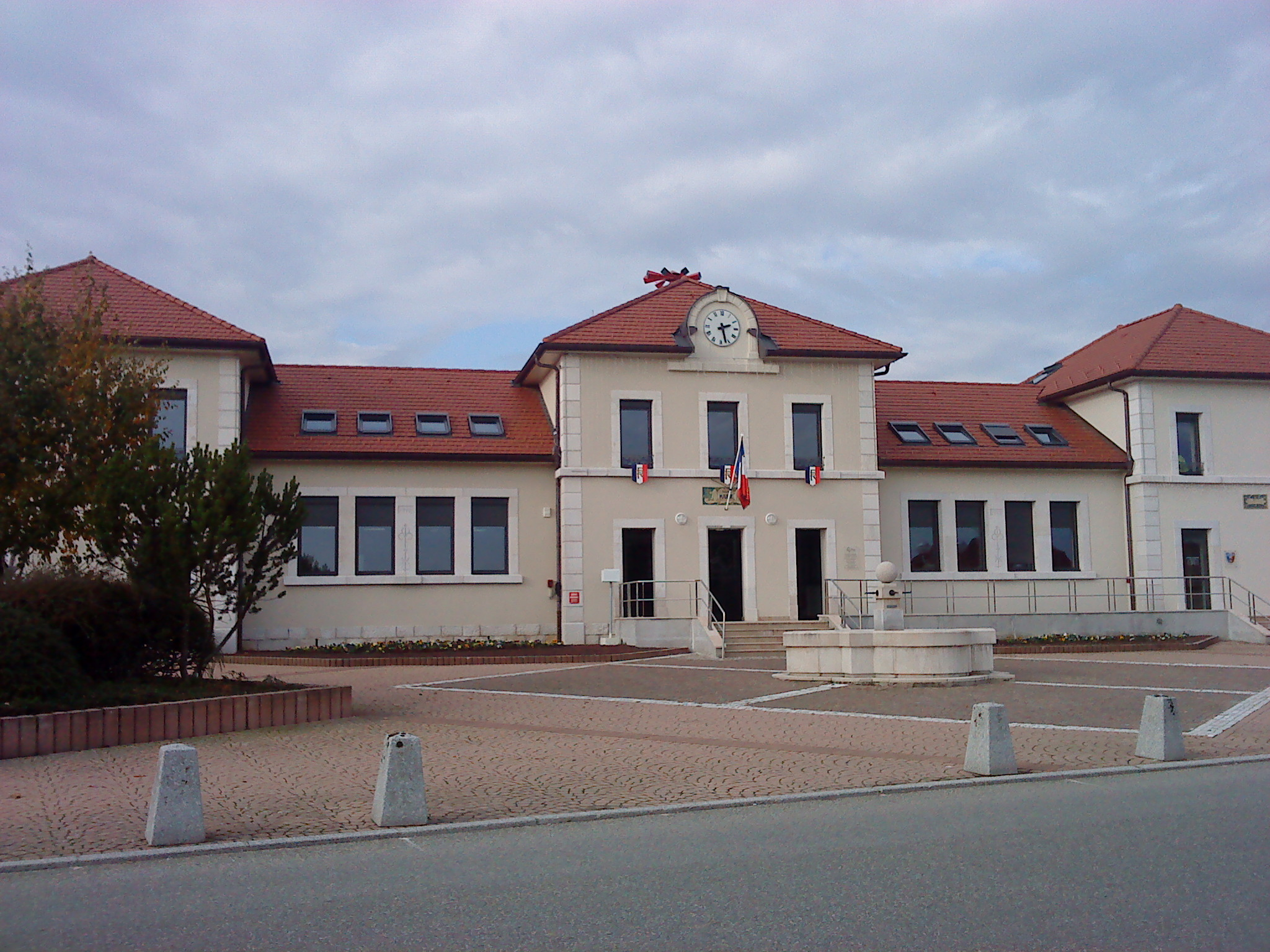 Mairie de Cessy (Ain, France)